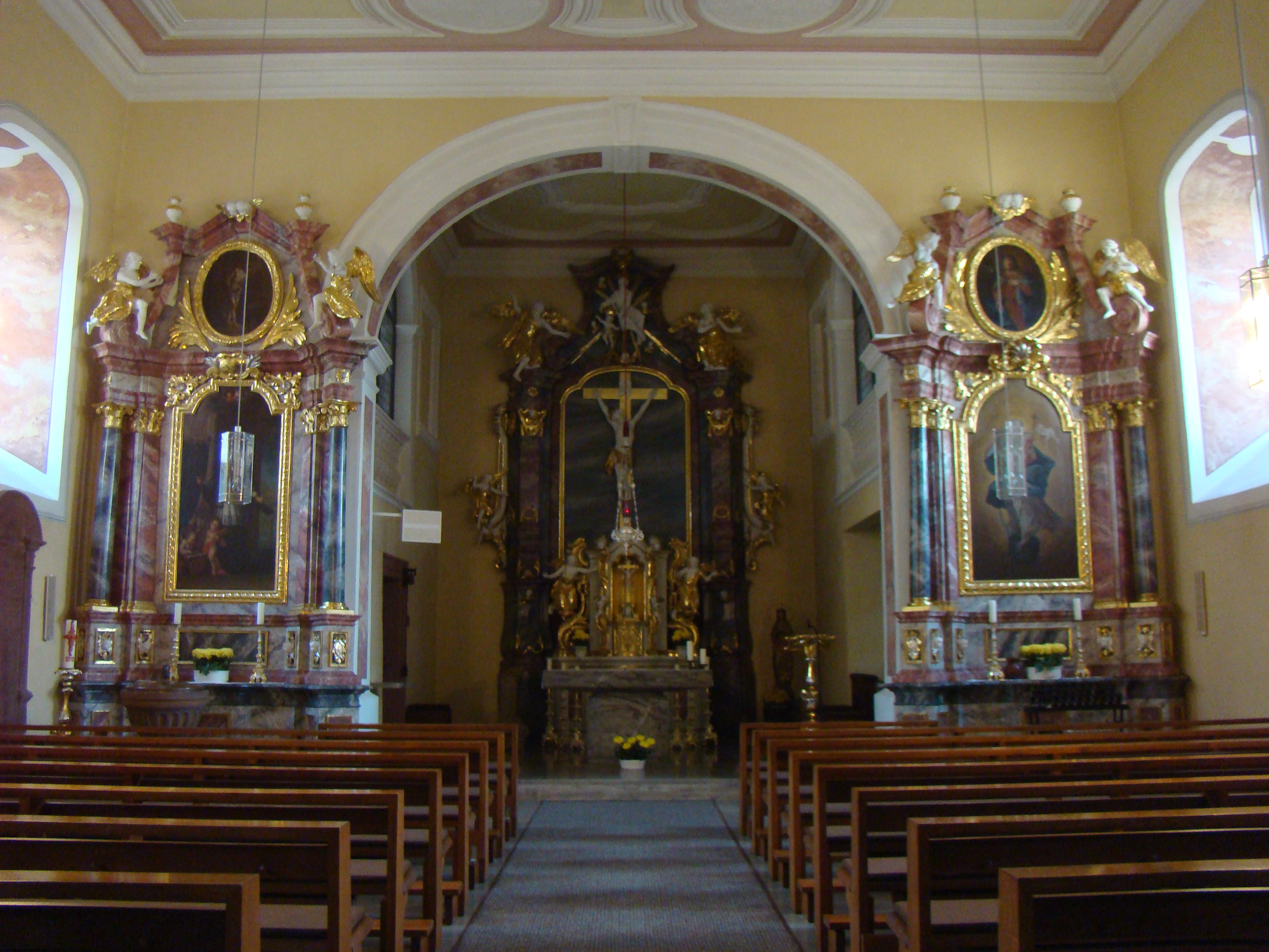 Boxberg (Baden), St. Aquilinus